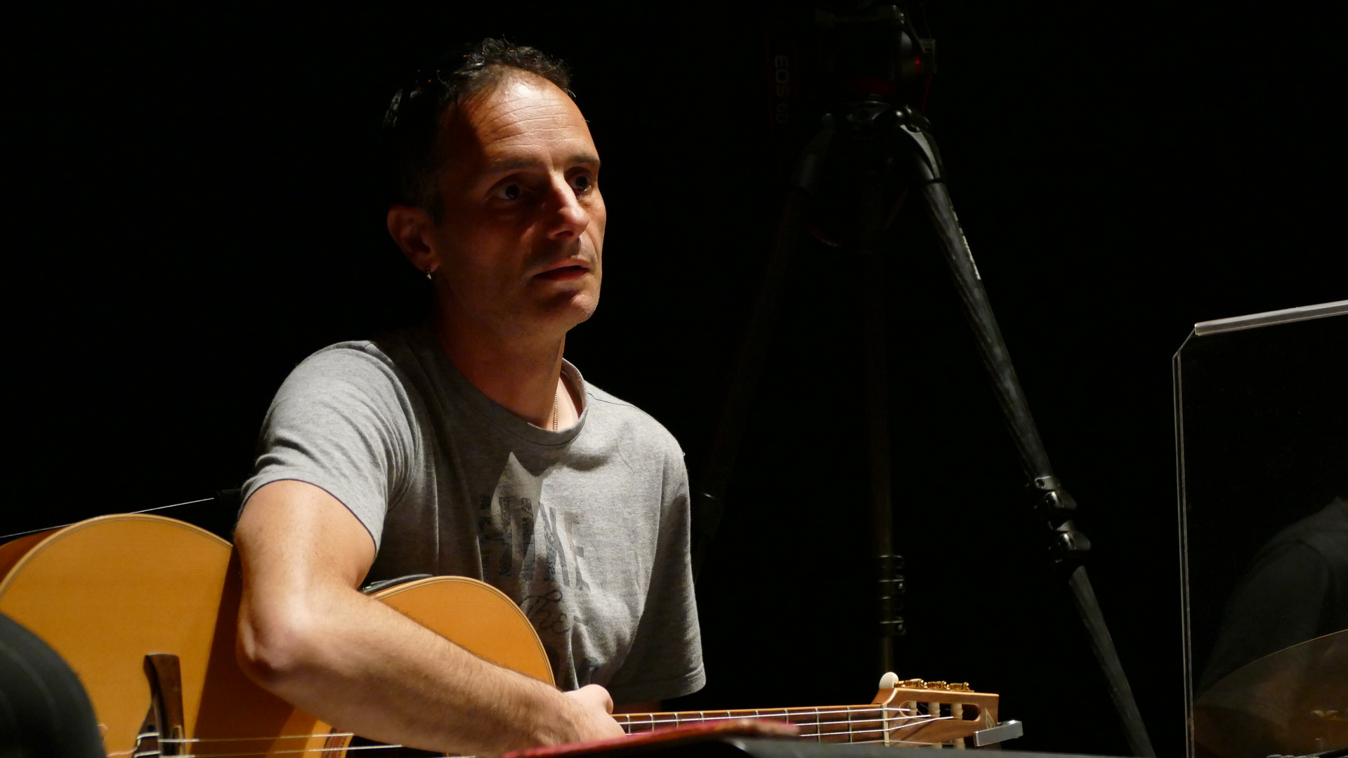 Michaël Cavalier, musicien